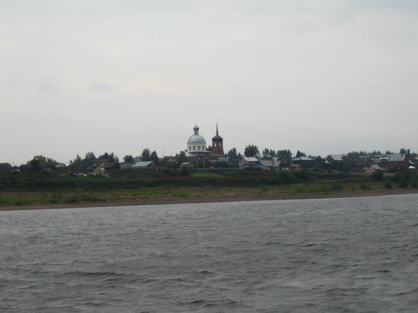 Бетьки (09.09.05)